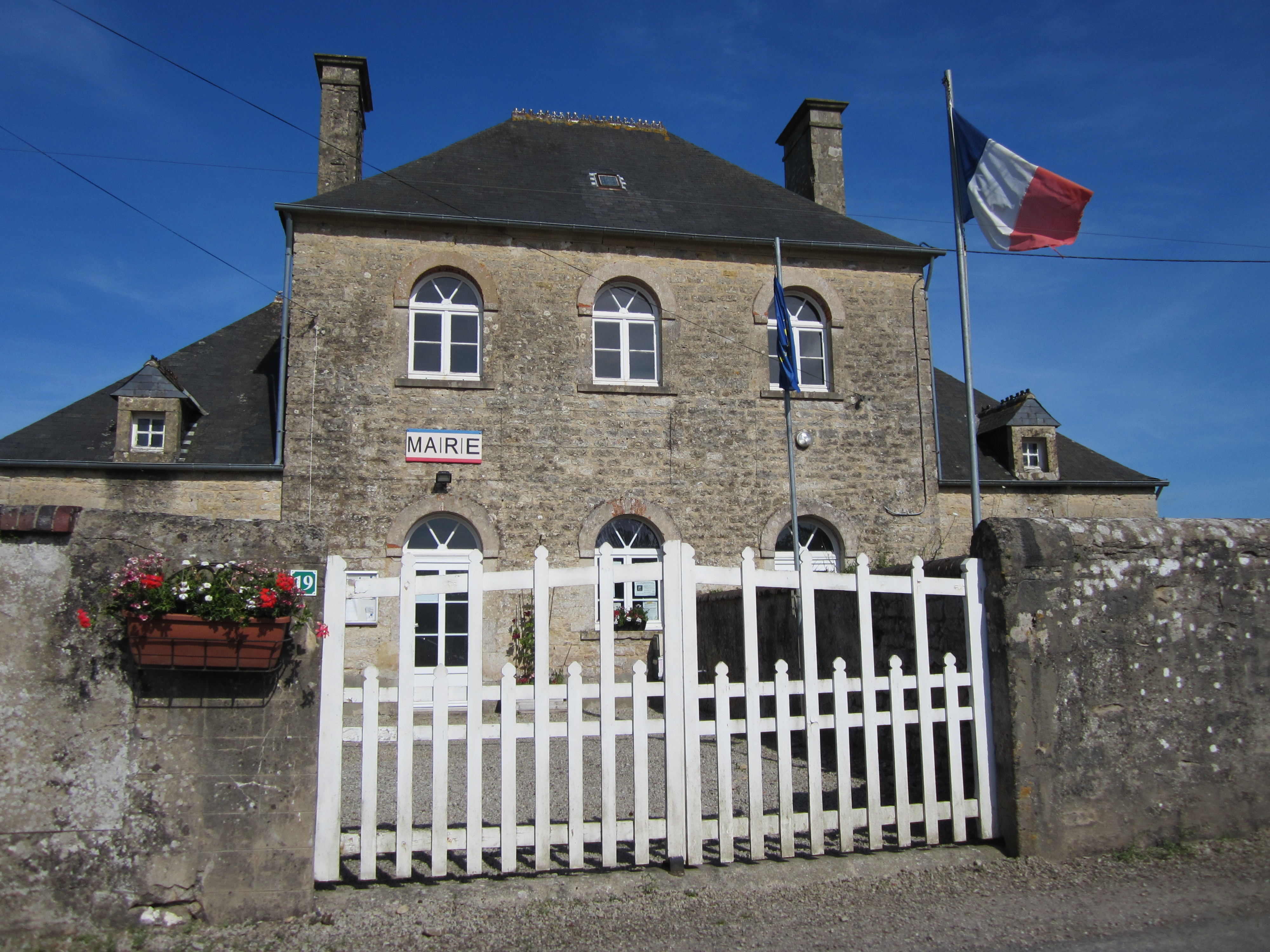 mairie d'Hémevez